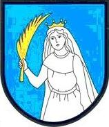 trnovec